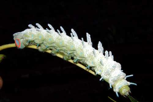 Full Caterpillar